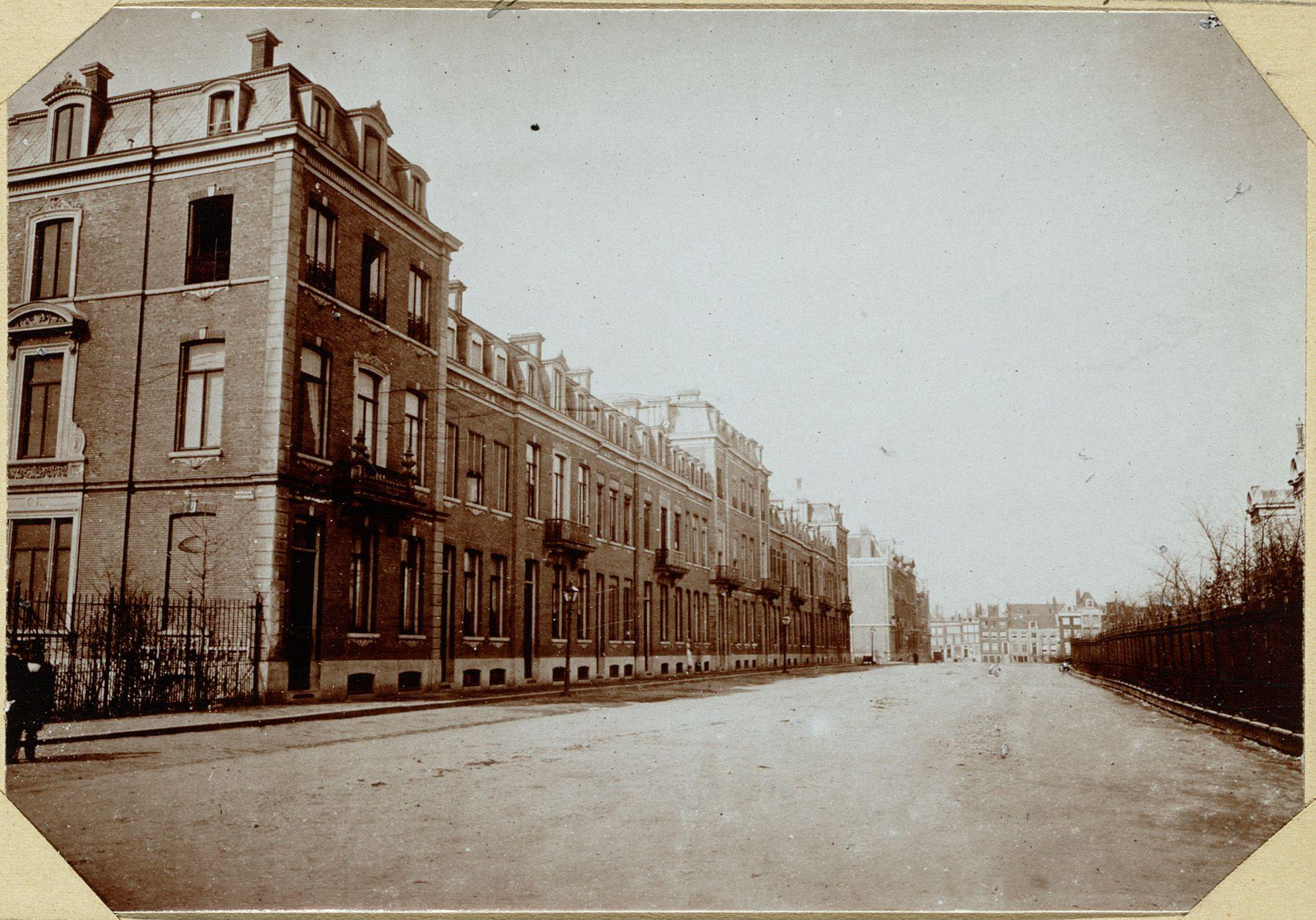 Beschrijving Het Westeinde, ziende van de Stadhouderskade naar het Frederiksplein. De overzijde thans bebouwdWesteinde 2-28, de huizen aan de oneven zijde zouden in 1882 gereed komen. Oorspronkelijke kabinetfoto uitgegeven door A. Jager. Foto 132 uit het album van W.J.R. DreesmannDocumenttype fotoVervaardiger Jager, A.Collectie Collectie Atlas DreesmannDatering 1870 ca.Geografische naam WesteindeInventarissen 010094000550 Generated with Dememorixer